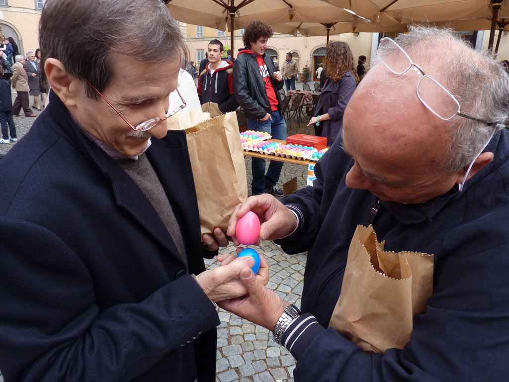 La tradizionale gara del Pont e Cul edizione 2012